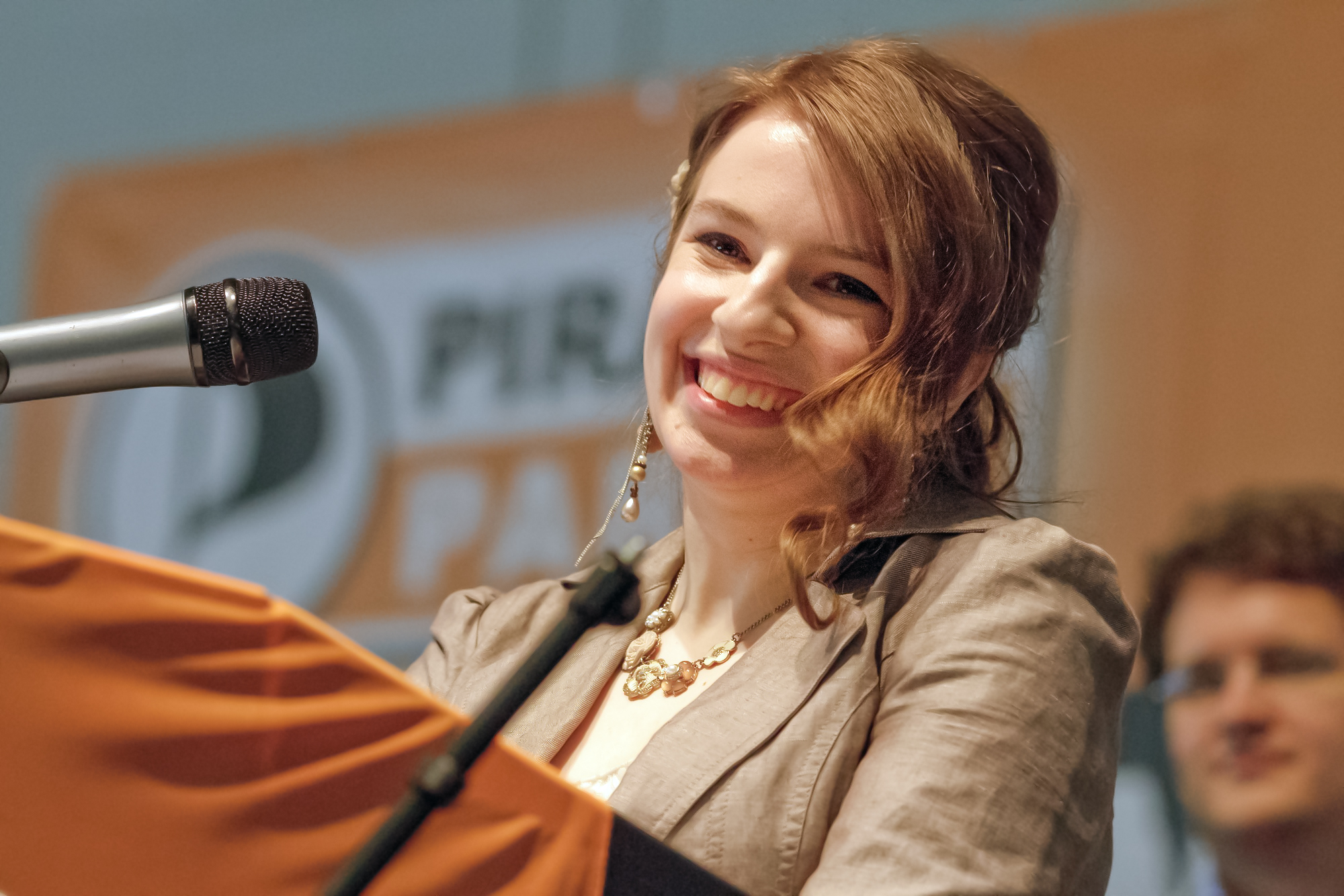 Marina Weisband, politische Geschäftsführerin der Piratenpartei im Bundesvorstand (2011-2012), auf dem Bundesparteitag Piratenpartei BPT 2012.1 in Neumünster, sichtbar gelöst bei der Eröffnungsrede. Im Hintergrund Sebastian Nerz.